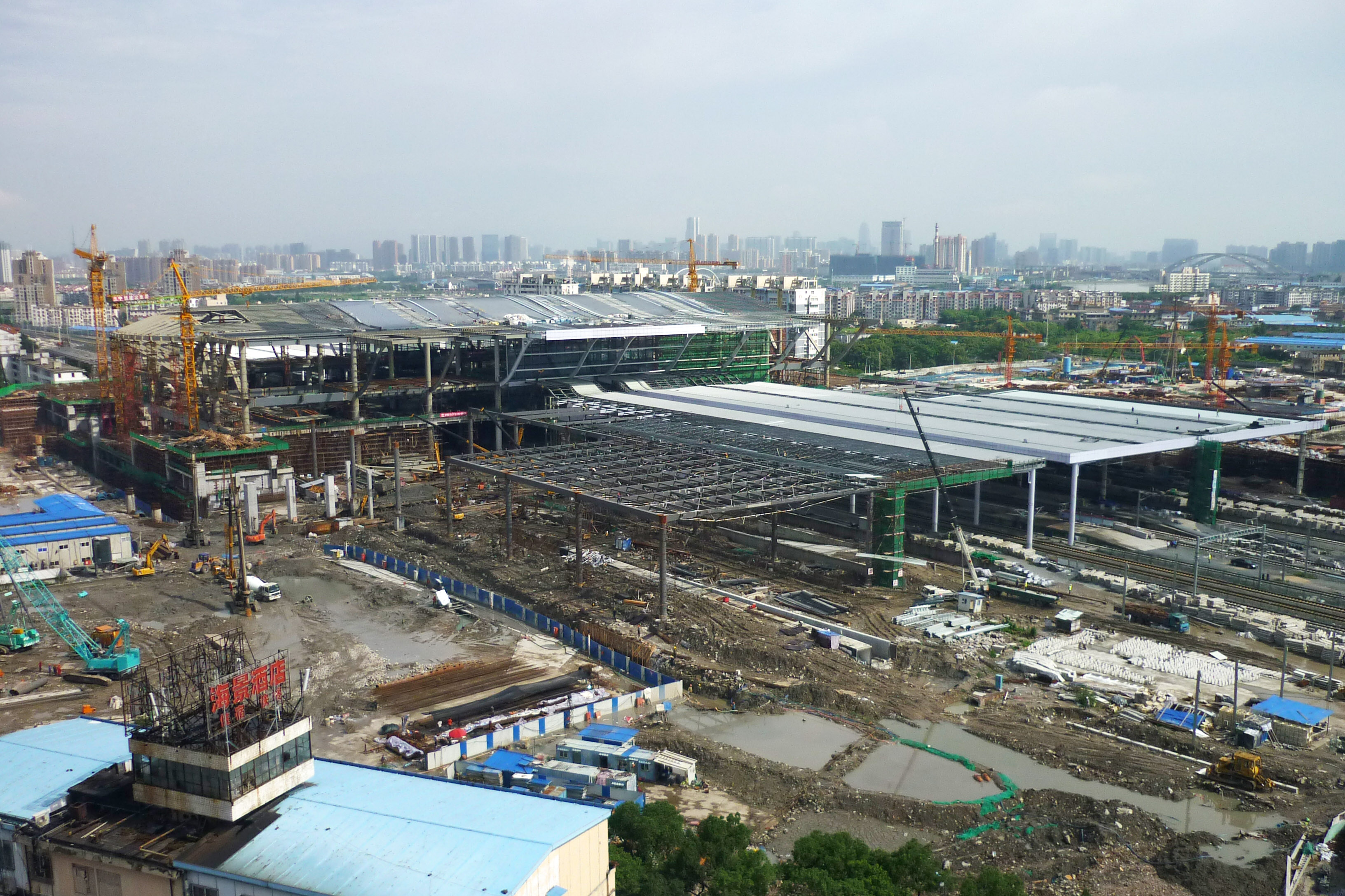 宁波站改建工地